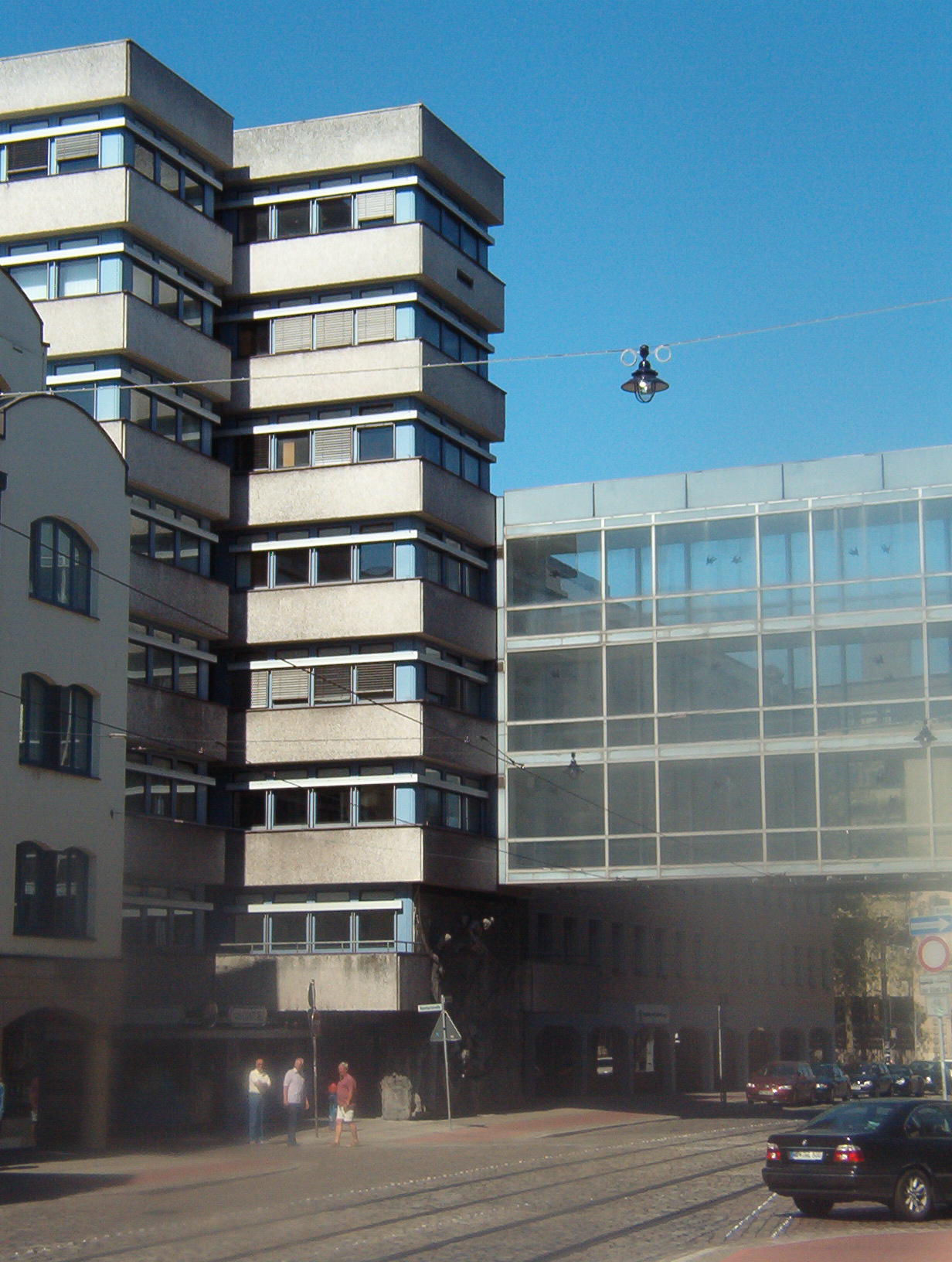 Amtsgerichtsgebäude in Bremen, Deutschland